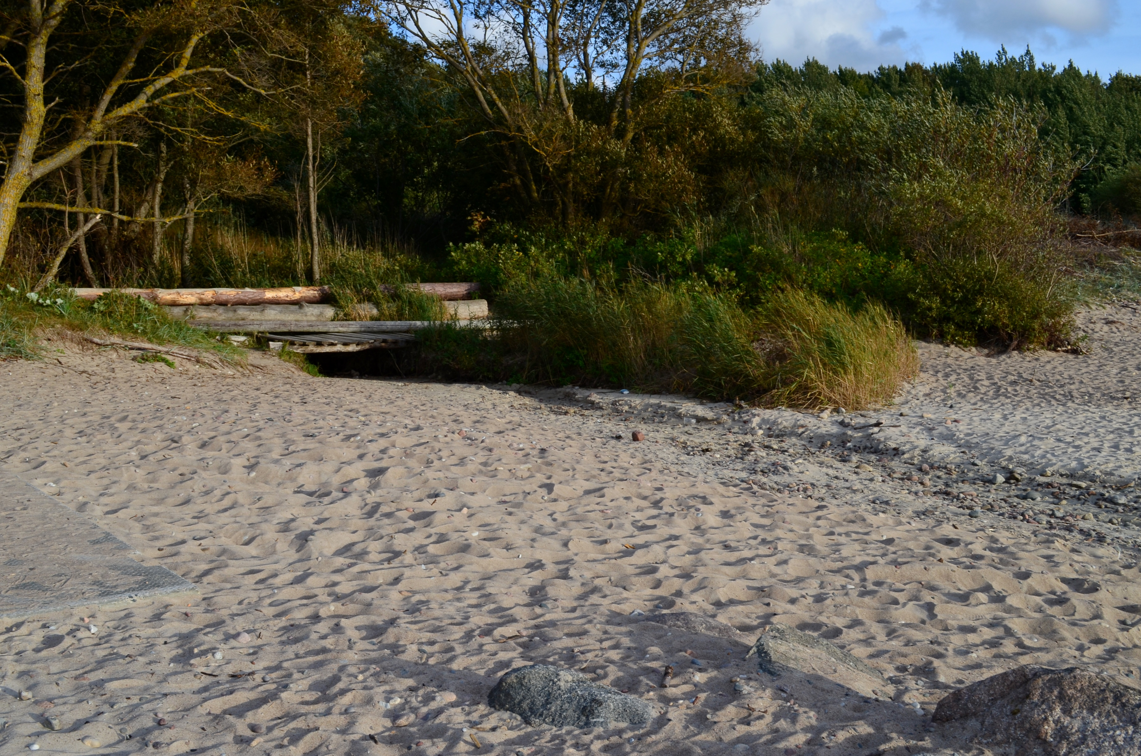 Cypos žiotys, Karklė, Klaipėdos raj.